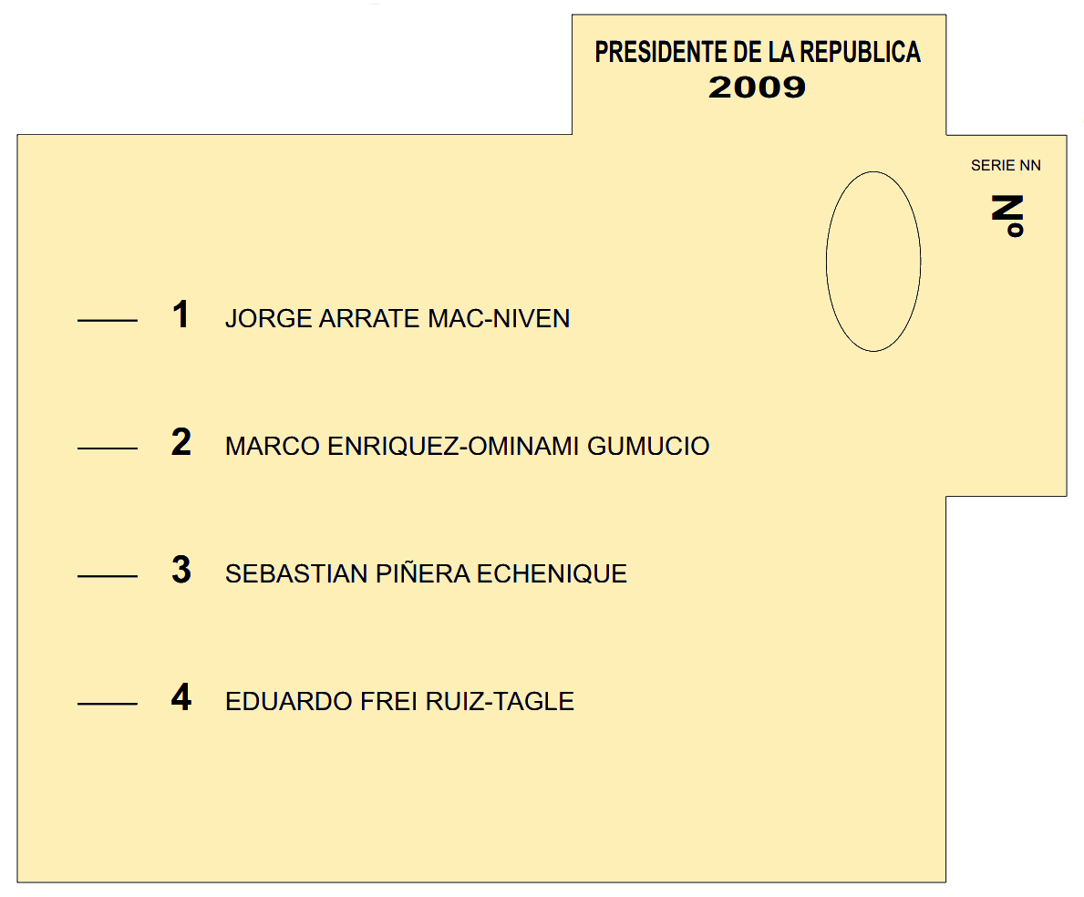 Reproducción facsimilar del voto utilizado en la elección presidencial de Chile de 2009.